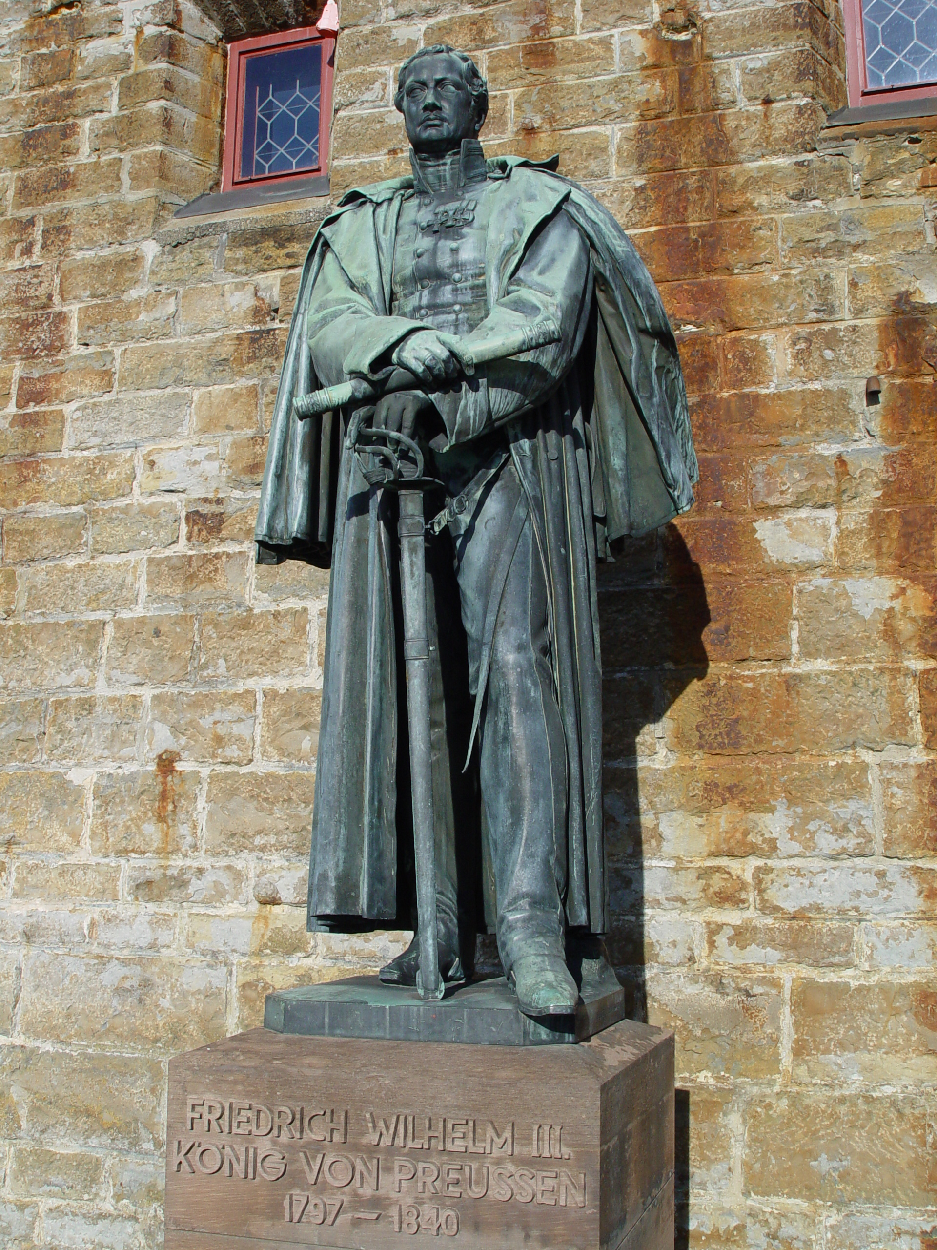 Statue von Friedrich Wilhelm III. auf der Burg Hohenzollern